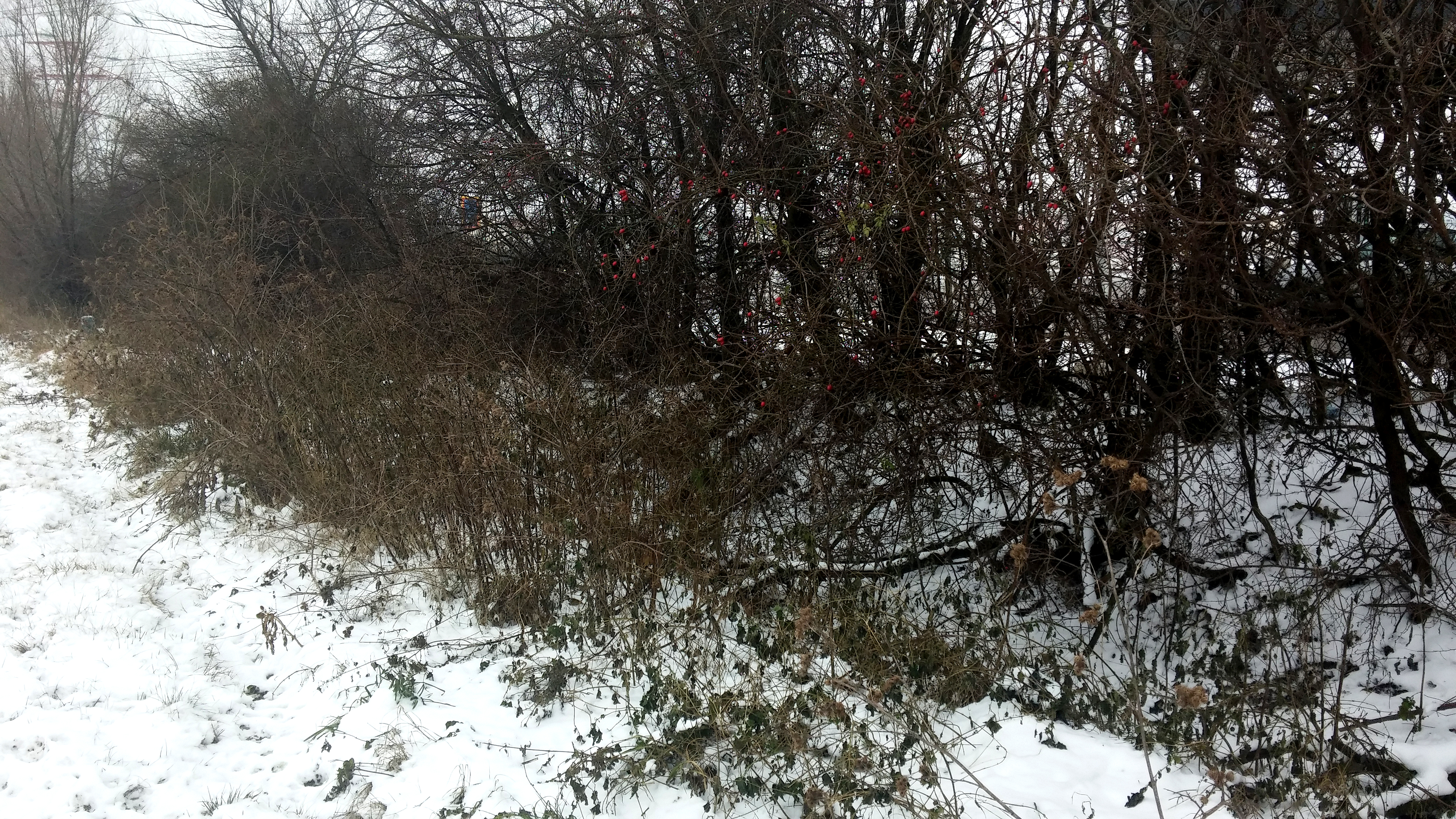 Verlauf des Kuruzzenwalles an der Grenze östlich des Outlet-Centers in Parndorf. Wall, Graben und Kontreeskarpe (Erdwall auf der -- östlich/links zu denkenden "Feindseite") sind noch erkennbar